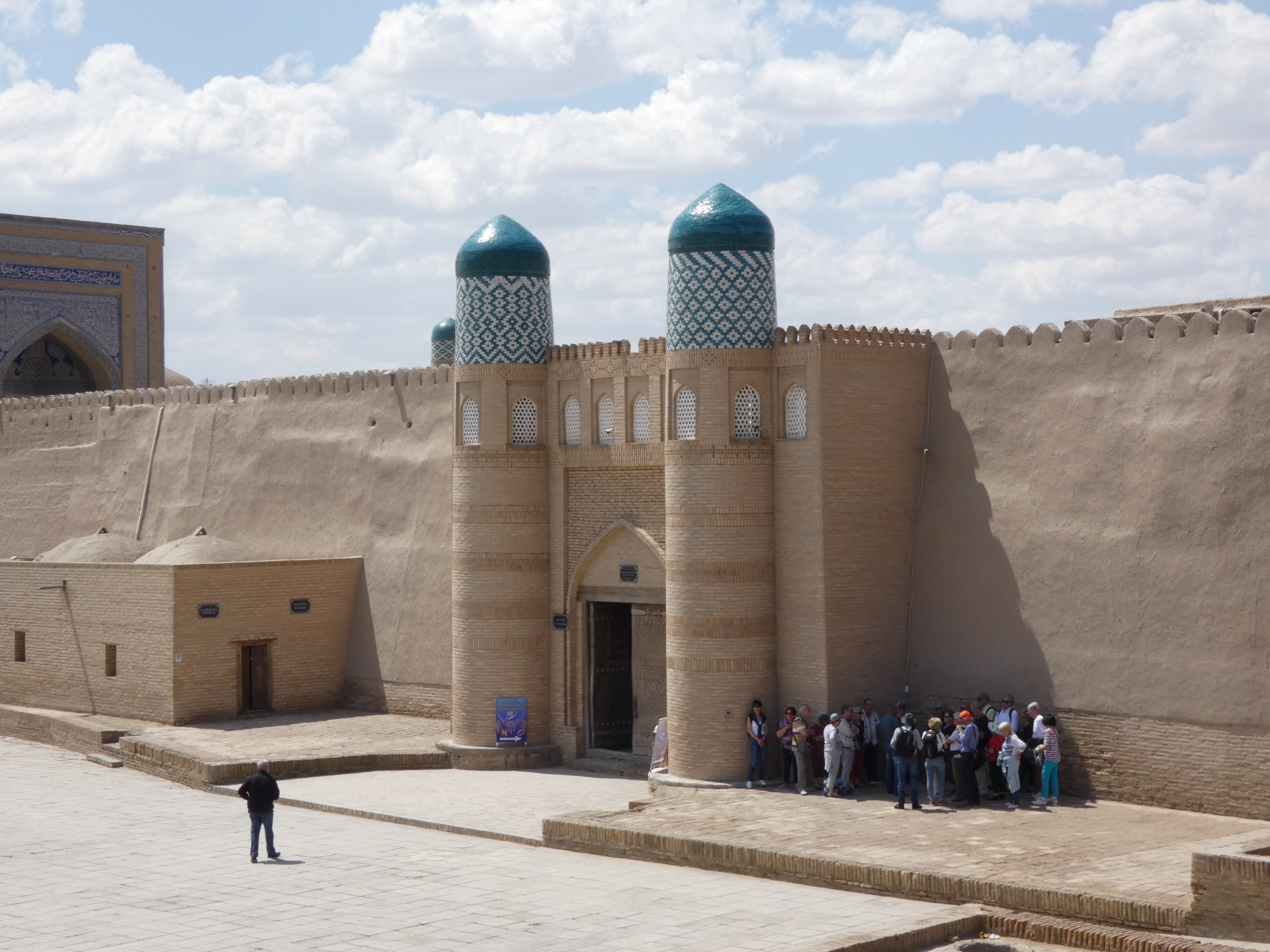 Konya Ark, Chiwa, Festungstor